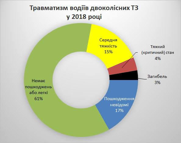 Травматизм водіїв двоколісних транспортних засобів у 2018 році у м. Київ згідно зі статистикою ГО "Мотохелп"